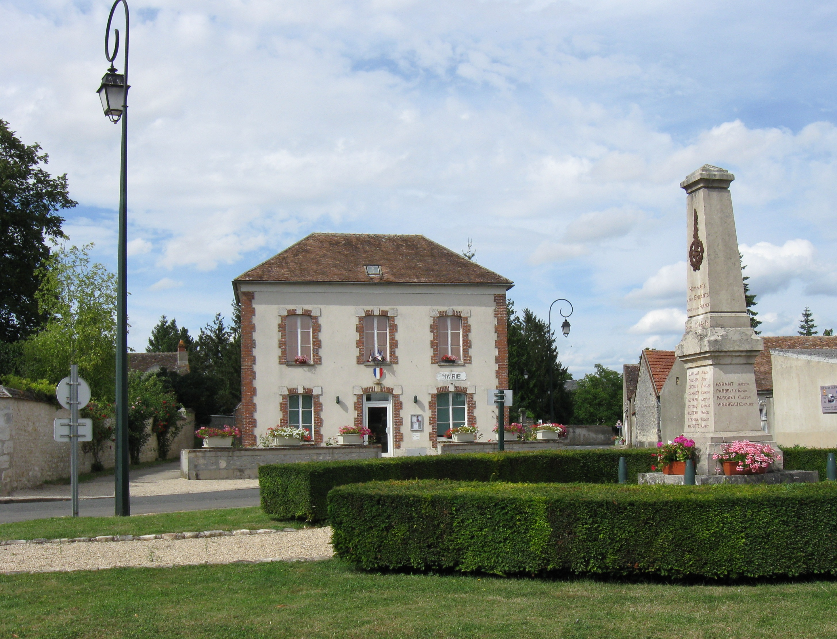 La mairie de Gironville. (département de la Seine-et-Marne, région Île-de-France).